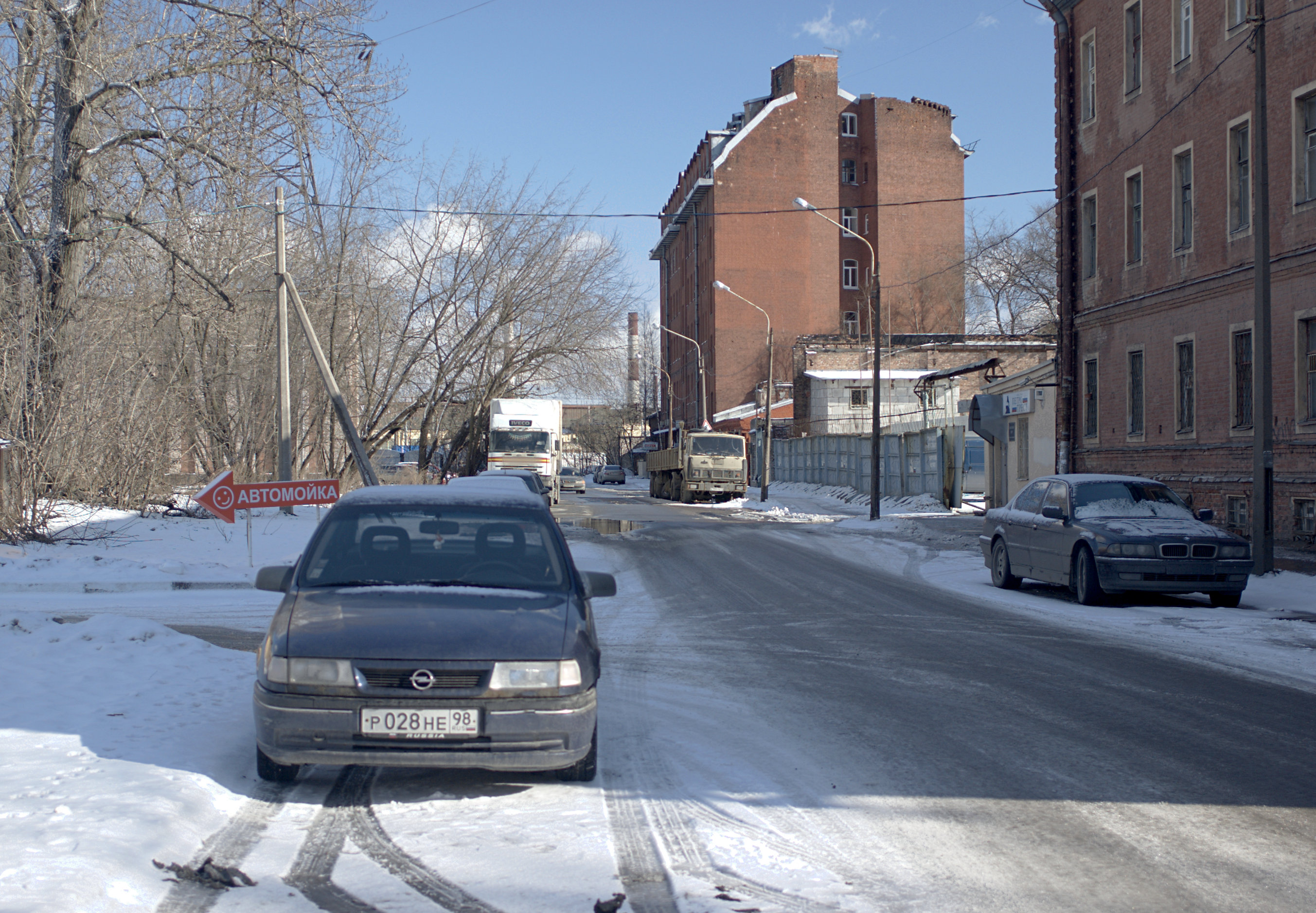 Нейшлотский переулок, Санкт-Петербург (вид в сторону ж/д)